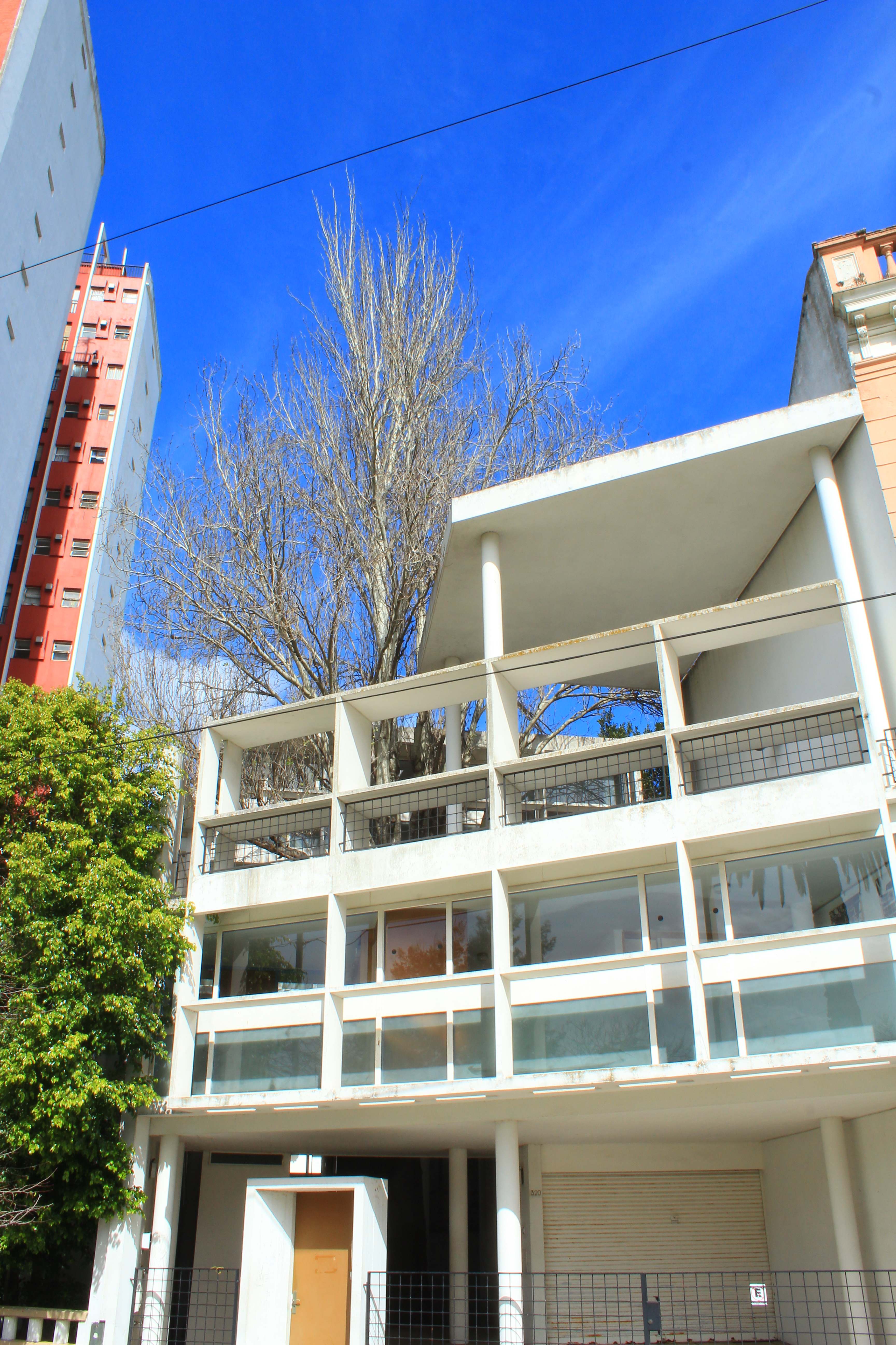 Edificio lindero Casa Curutchet (Av. 53 N.º 324)